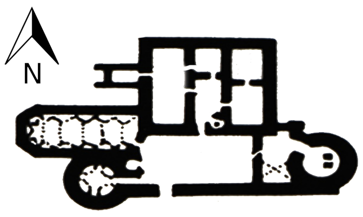 Grundriss des Schlosses Schleinitz bei Lommatzsch